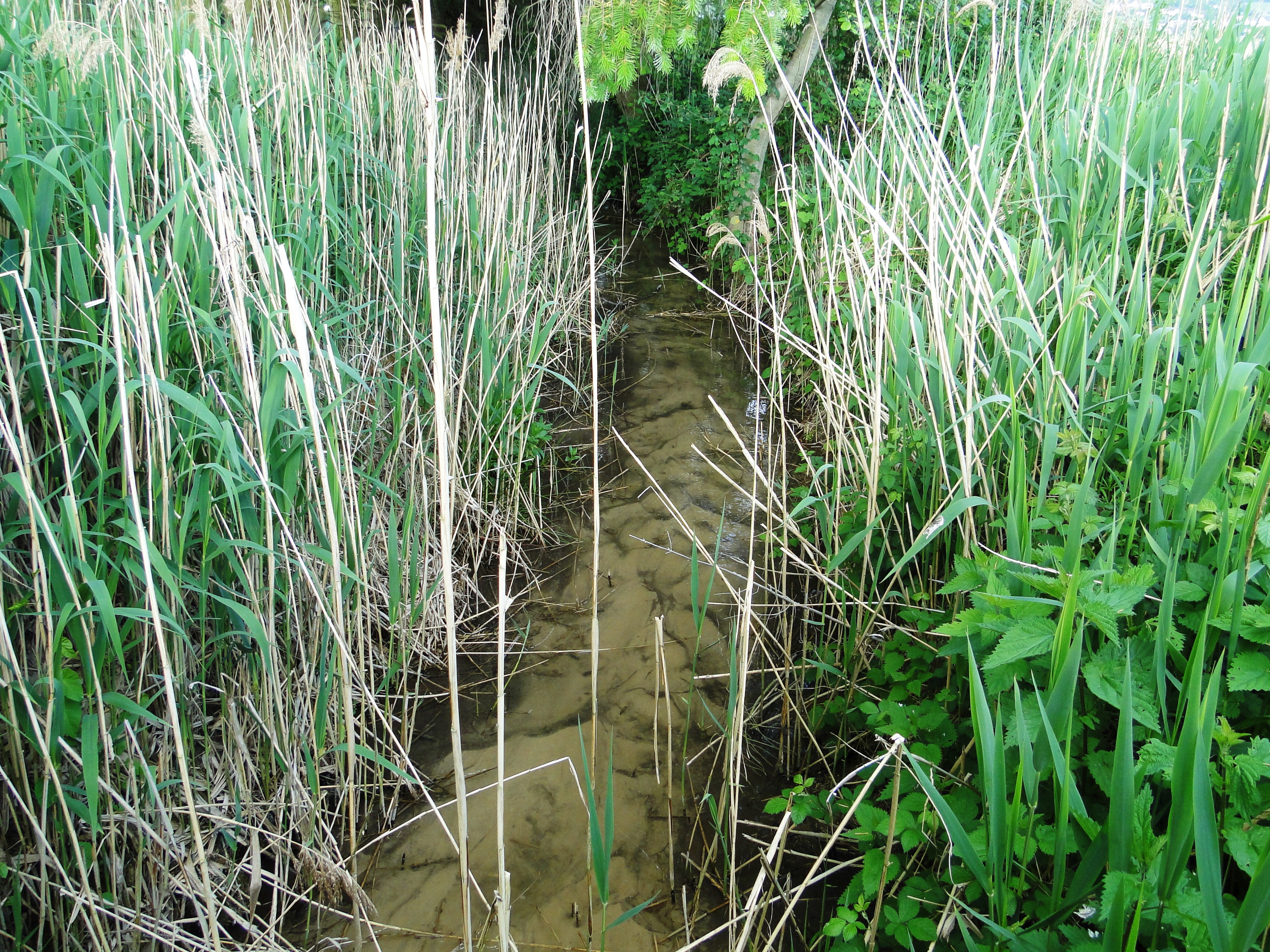 D'Millebaach am Schwunnendall, op der Héicht vum CR123